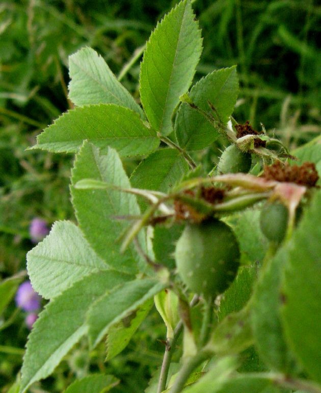 osa sherardii